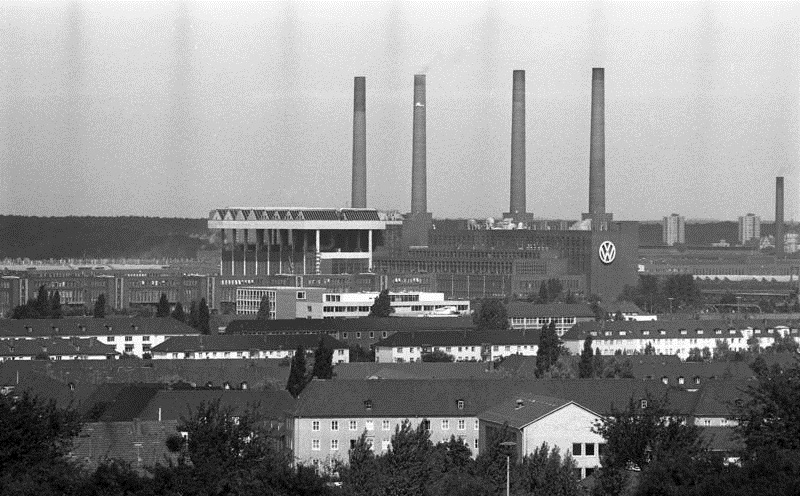 VW-Werk Wolfsburg Blick auf VW-Werk